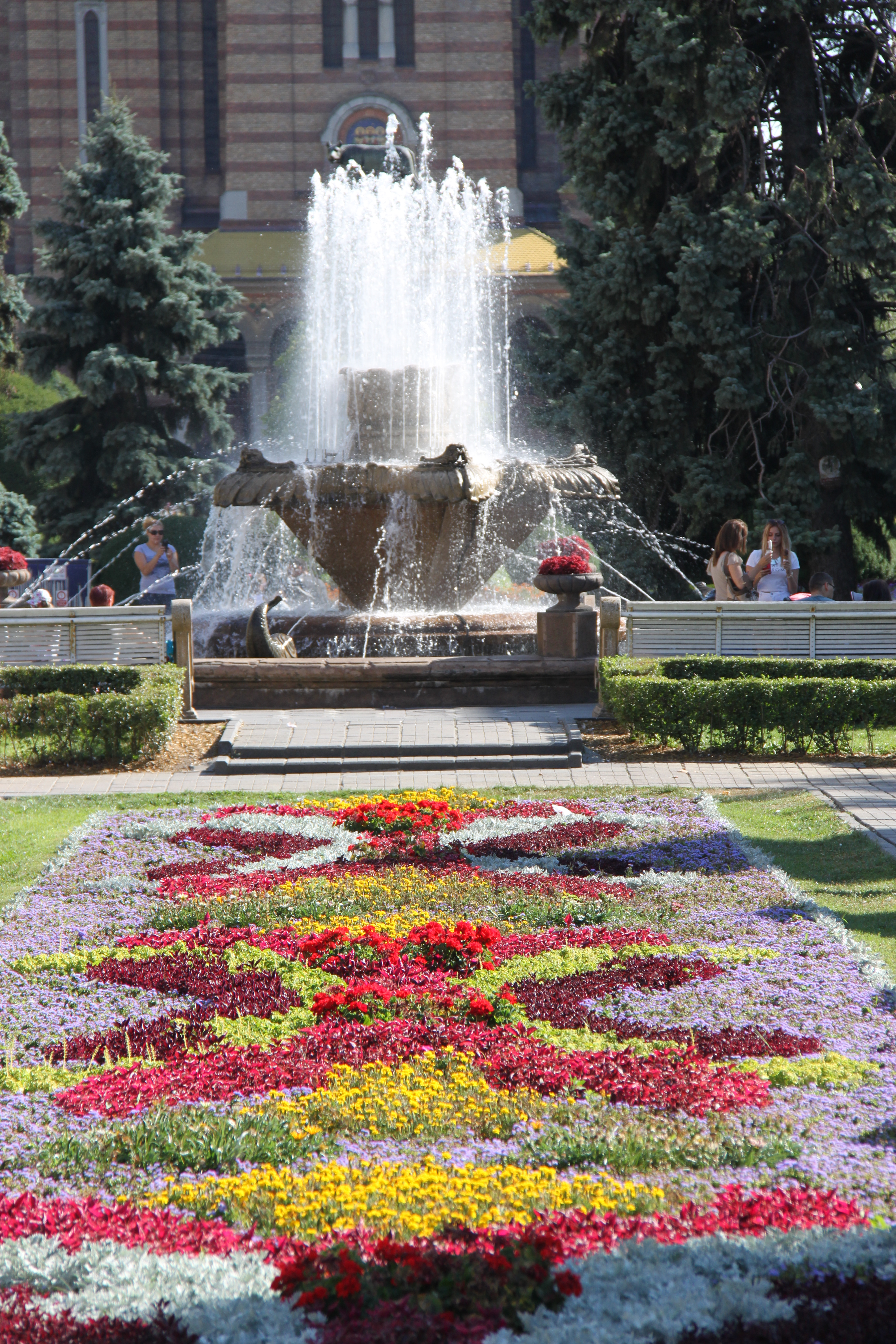 Fântâna cu pesti (Timișoara)